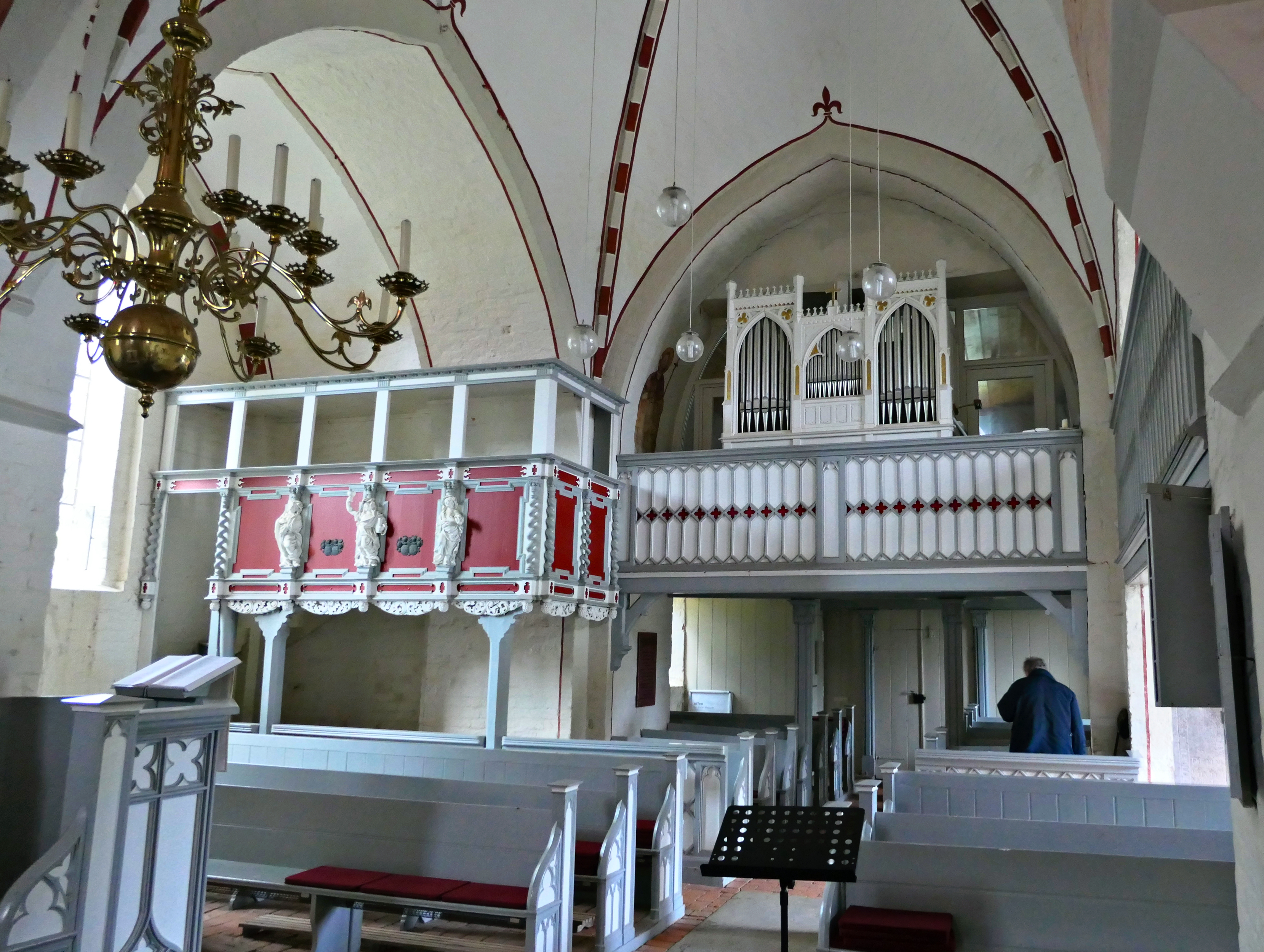 Orgel der Kirche Elmenhorst, Kalkhorst, Landkreis Nordwestmecklenburg, Mecklenburg-Vorpommern, Deutschland